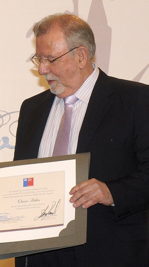 Óscar Hahn, poeta chileno ganador del Premio Nacional de Literatura de Chile en 2012